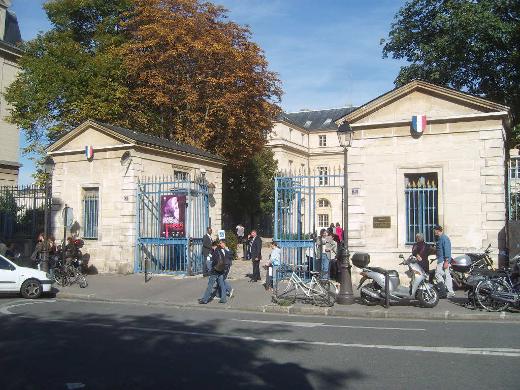 Paris 5e arrondissement - rue Descartes - collège de Boncourt, Ministère de la Recherche Scientifique - pavillons d'entrée